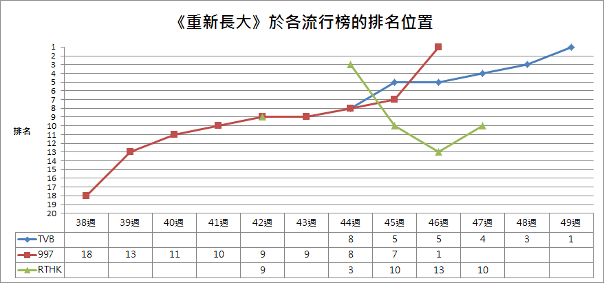 歌曲《重新長大》於各流行榜的排名位置